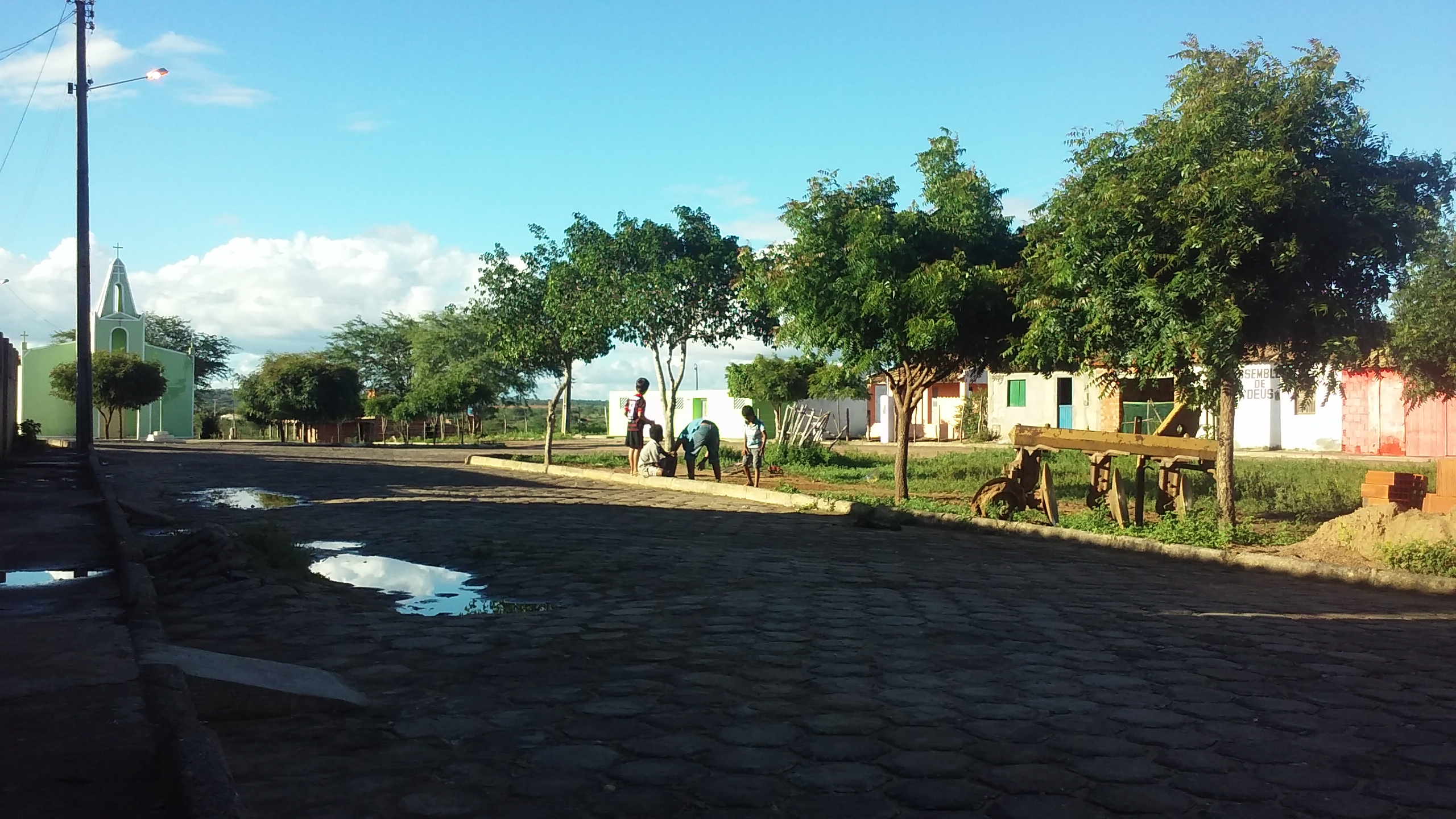 Praça Central